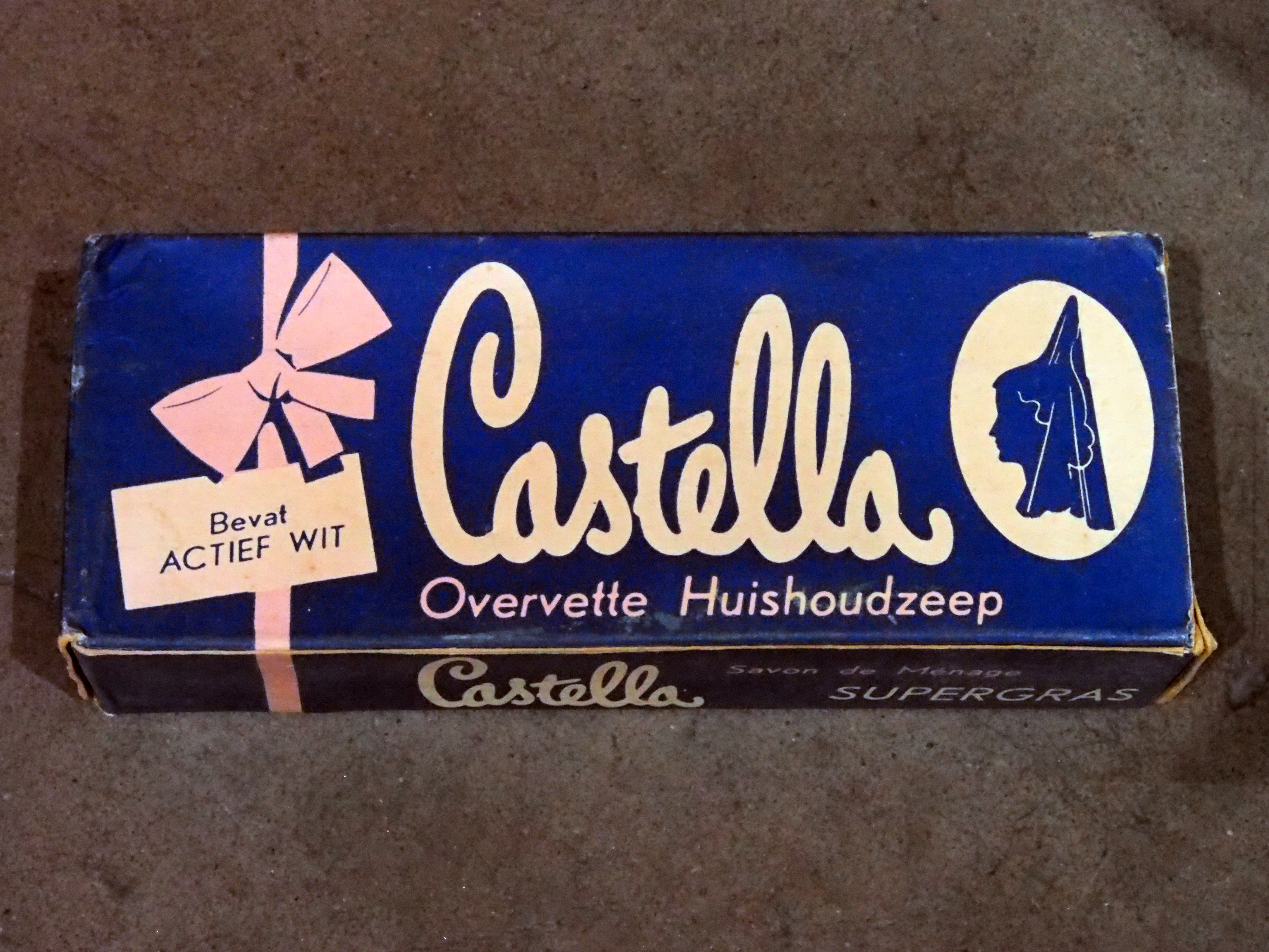 Castella overvette Huishoudzeep